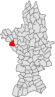 Categorie:Hărţi ale judeţului Olt